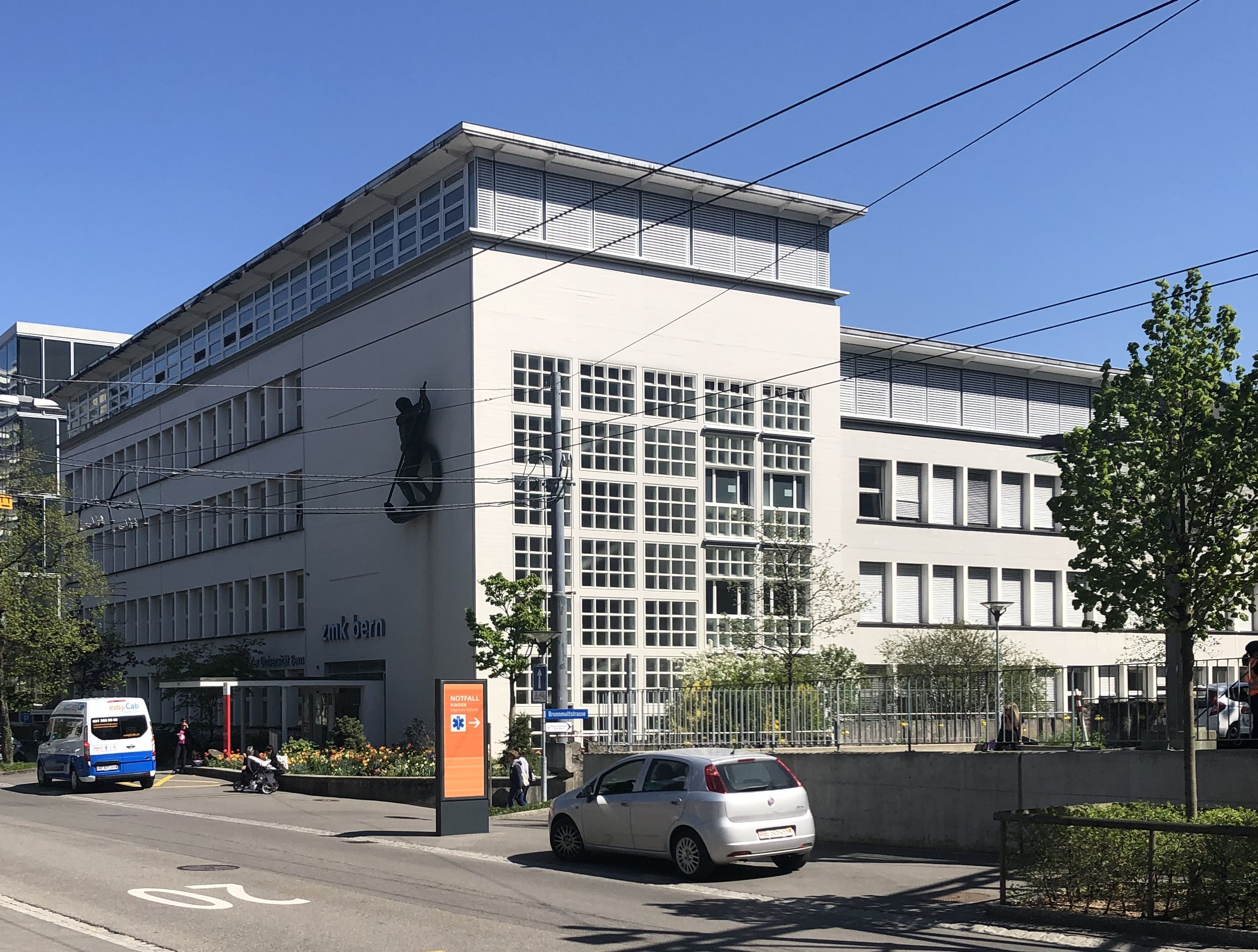 Inselspital Zahnklinik